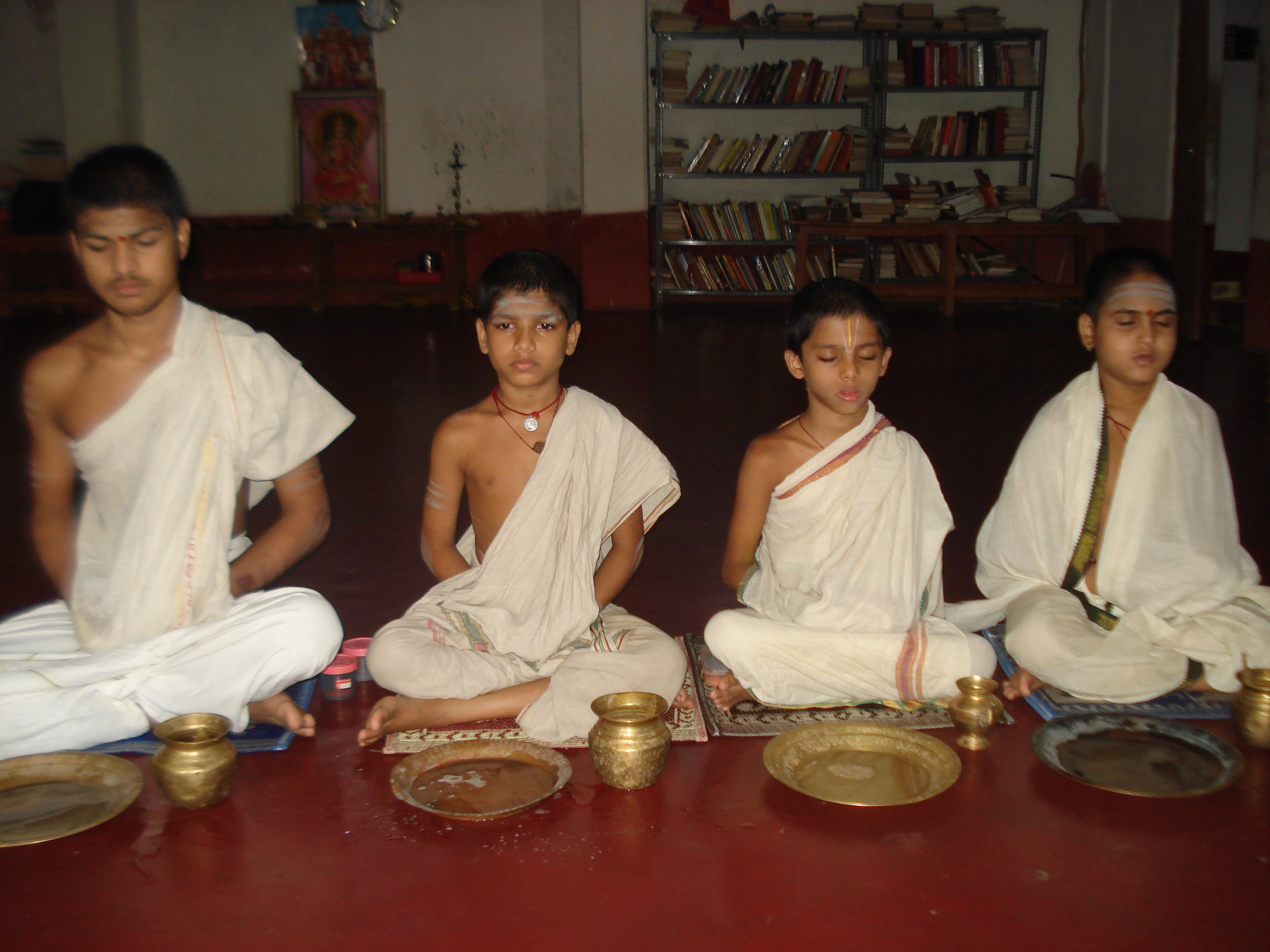 Veda pathashala students doing sandhya vandanam. Location: Nachiyar Kovil, Kumbakonam, Tamilnadu